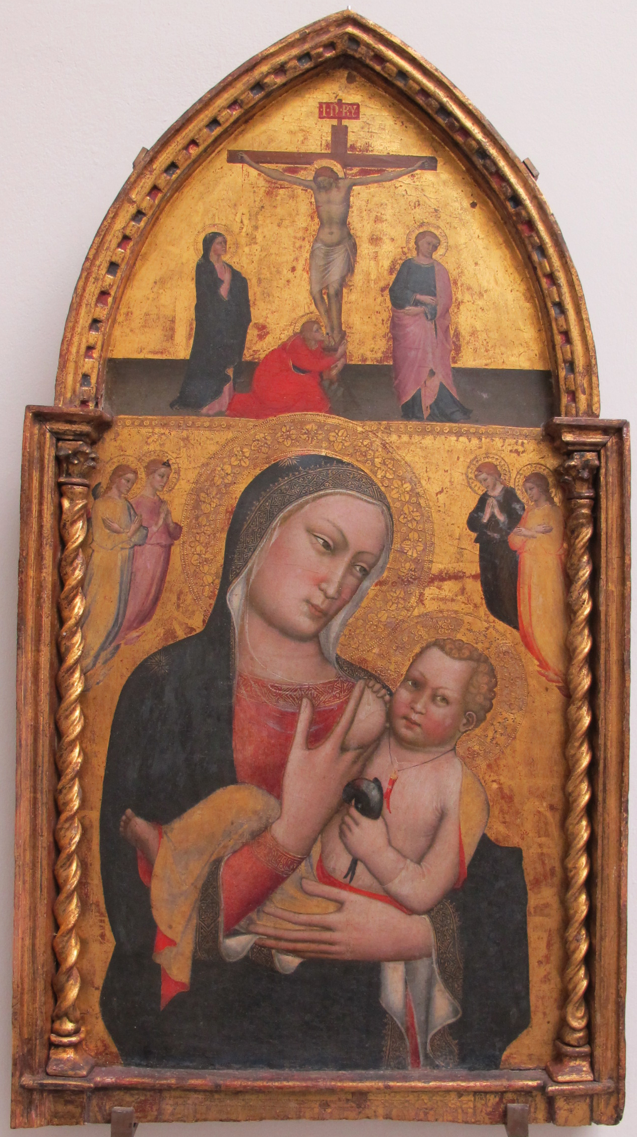 Ambrogio di baldese, madonna del latte, da s. croce